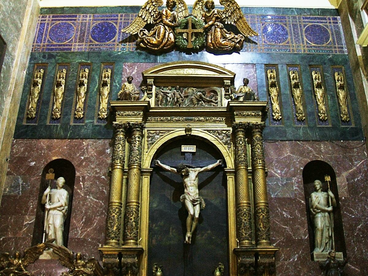 Altar de Jesucristo Rey de los Mártires, en la Basílica Menor y Santuario Nacional de la Gran Promesa, Valladolid, España/Spain